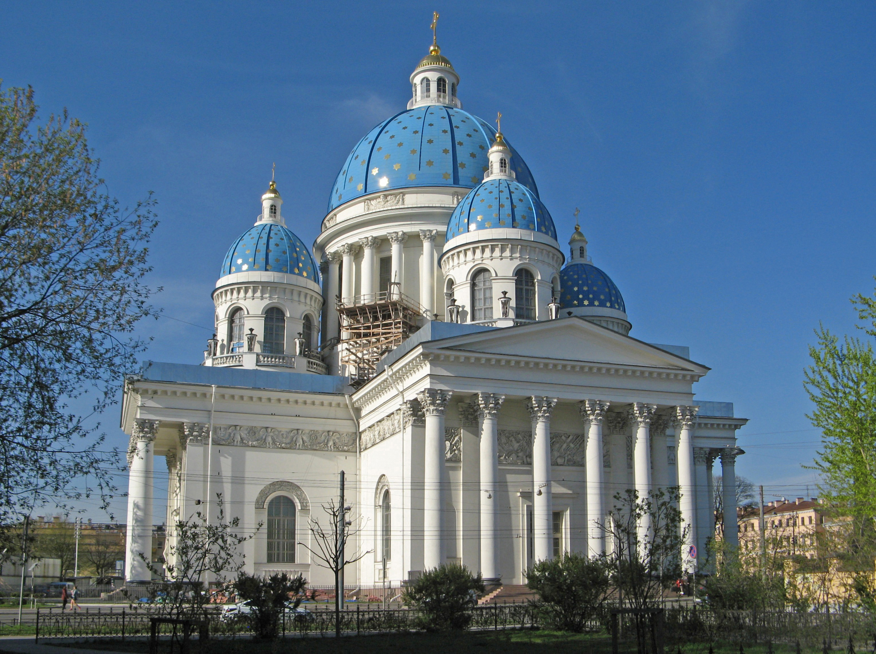 Собор Троицкий (Измайловский): Измайловский проспект, 4-а, 7-а, Адмиралтейский район, Санкт-Петербург